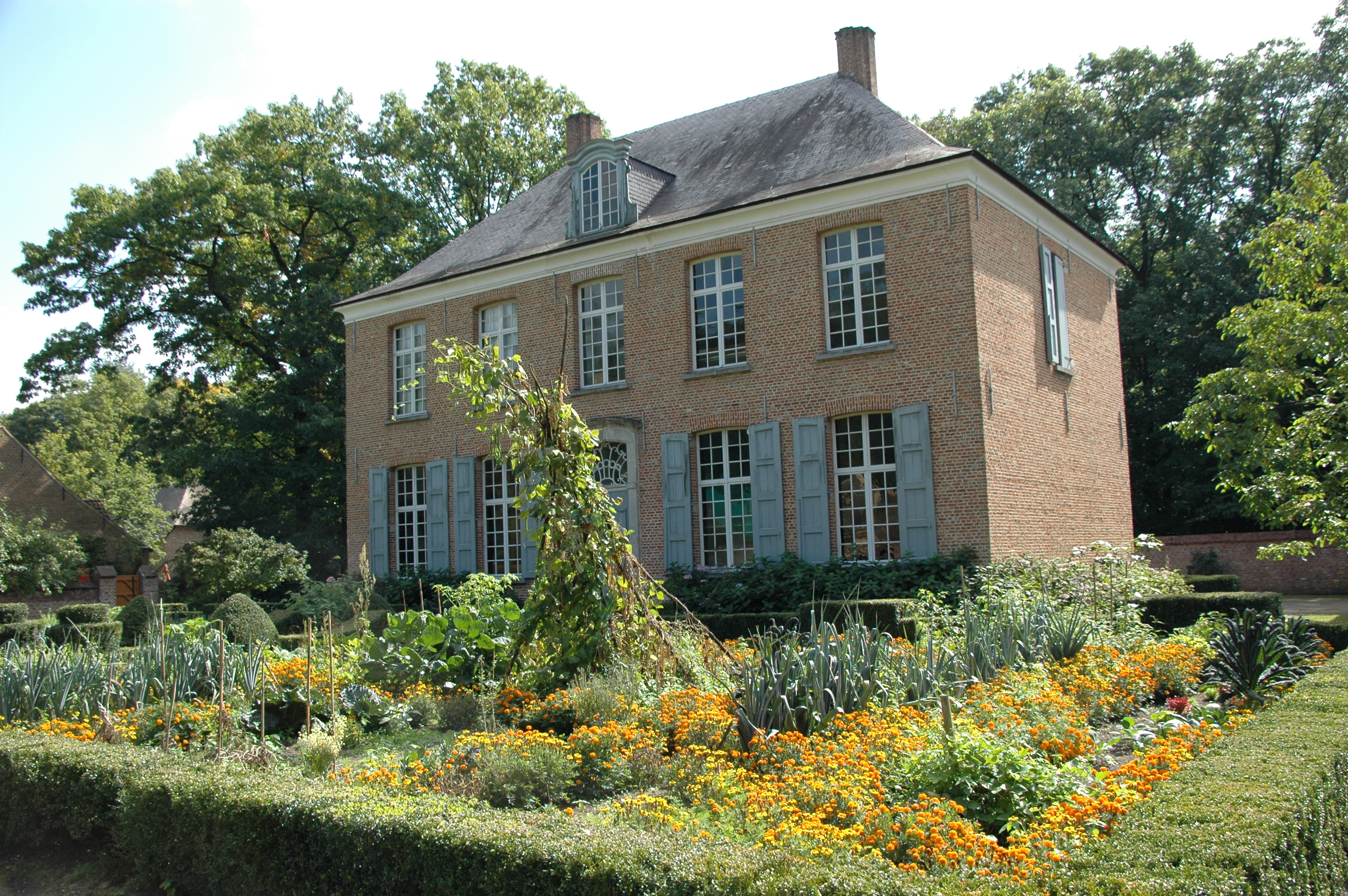 Bokrijk, Domein Bokrijk, Openluchtmuseum Bokrijk, pastorij van Schriek, pastorijtuin aangeplant naar voorbeeld van 19de eeuwse pastorijtuinen (mengeling van nutsgroenten en sierplanten in formele stijl).